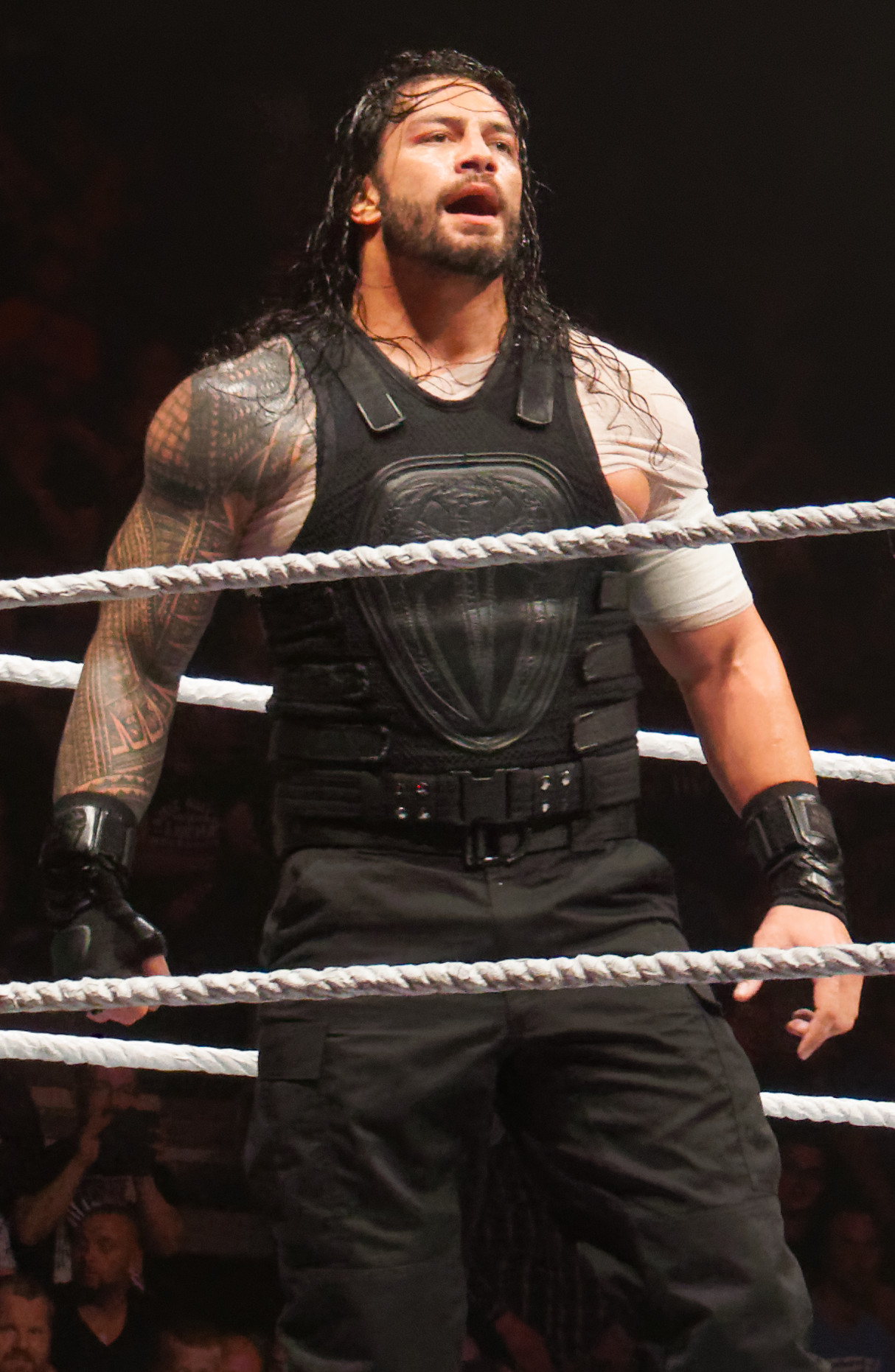 Roman Reigns & Seth Rollins defeat Bray Wyatt & Samoa Joe ( Le vendredi 12 mai, la WWE Live Tour fera escale au Country Hall a Liege pour le spectacle de catch de l'annee! Au programme: des duels impitoyables et des rencontres captivantes entre les meilleures equipes et les plus grands rivaux. )